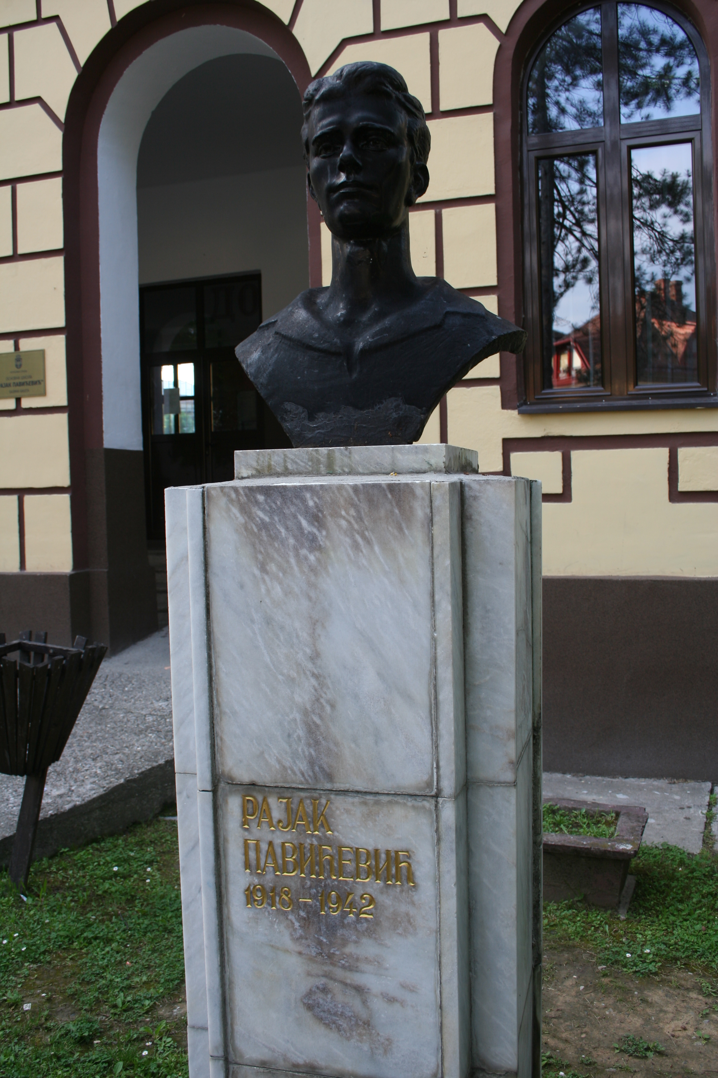 Bajina Bašta u maju 2017.